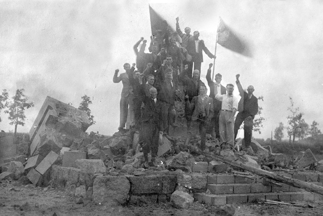 MuuseumikoguFotokoguOlemusfotoOriginaaloriginaalSäilivushea legend Tahkuranna Fotograaf teadmata